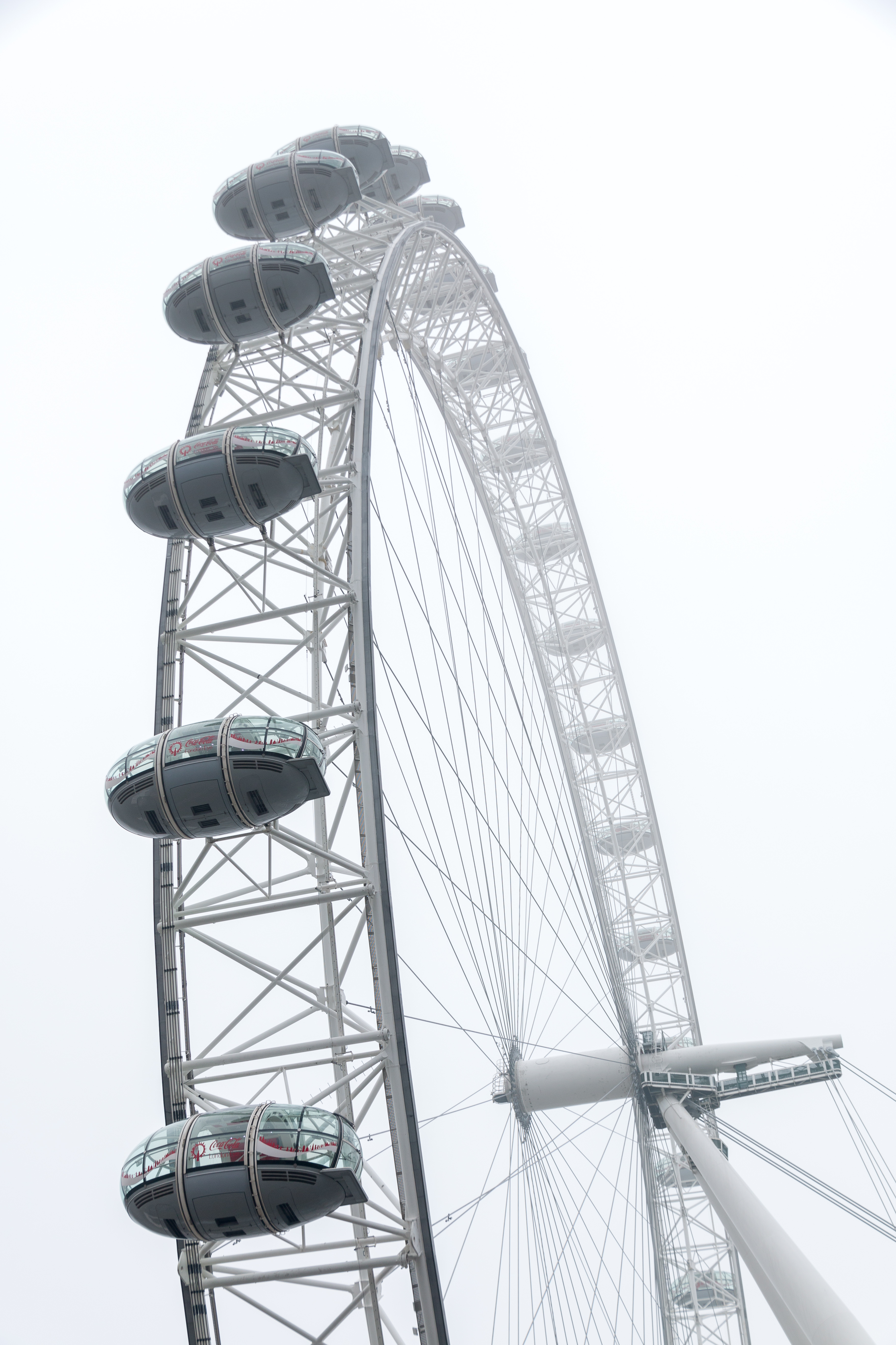 London March 2018. See profile for image use.